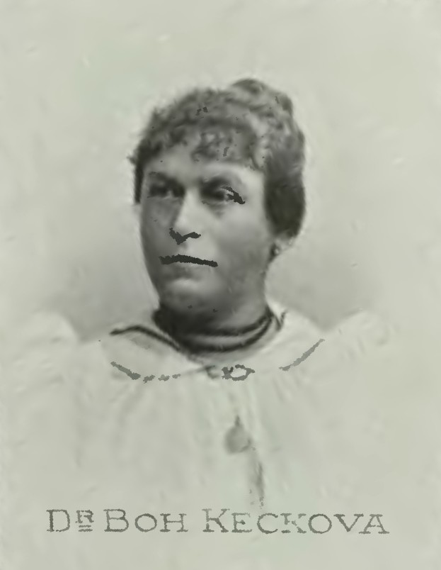 Portrét – Bohuslava Kecková (1854 - 1911), Česká lékařka.